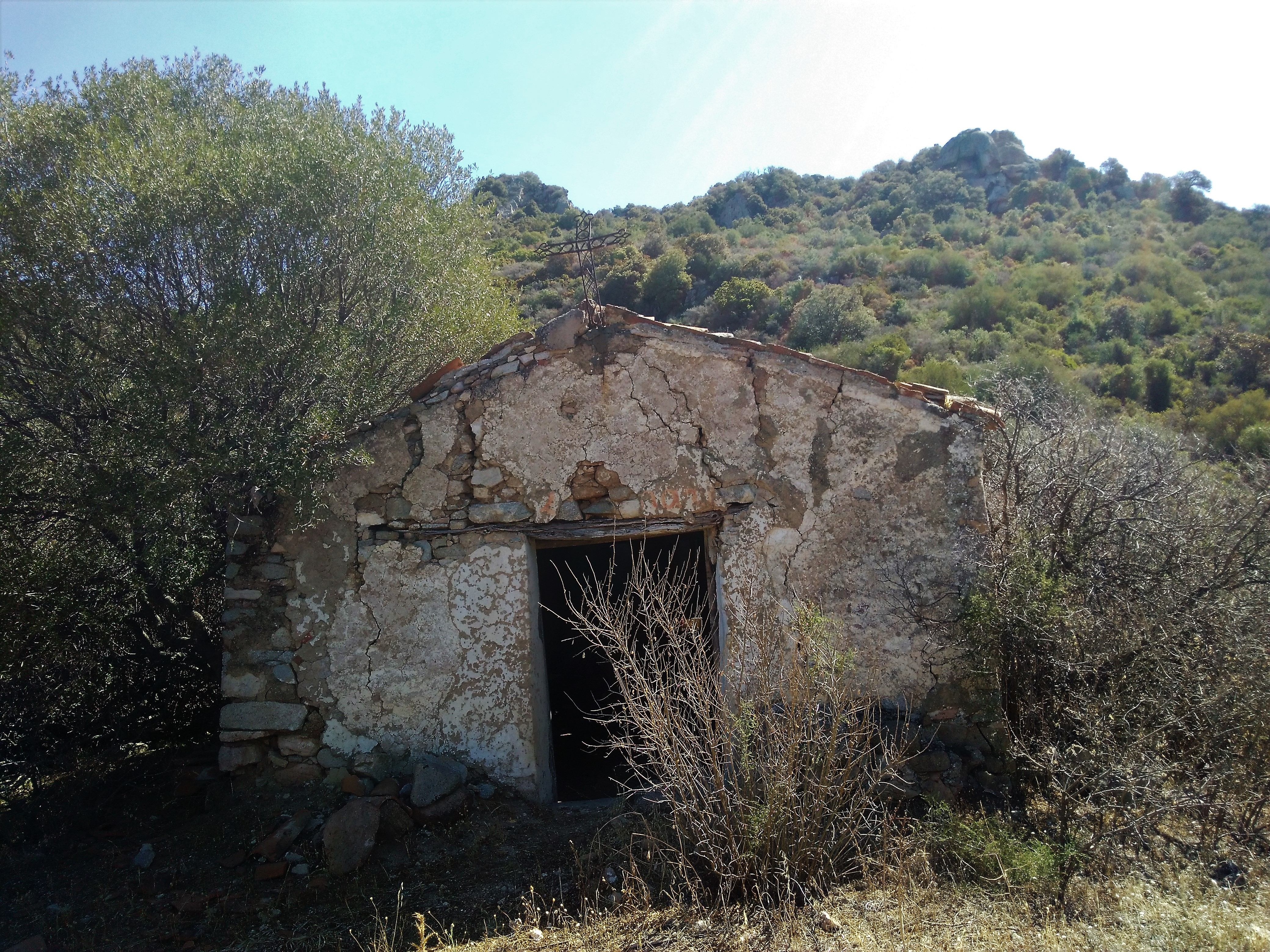 Orgosolo, chiesa di San Leonardo un tempo connessa al villaggio abbandonato post-medievale di Locoe